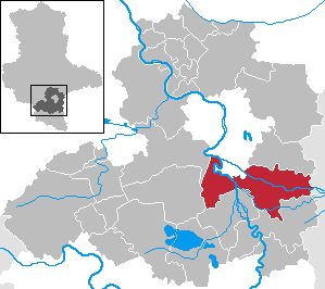 Schkopau in Saxony-Anhalt - Saalekreis